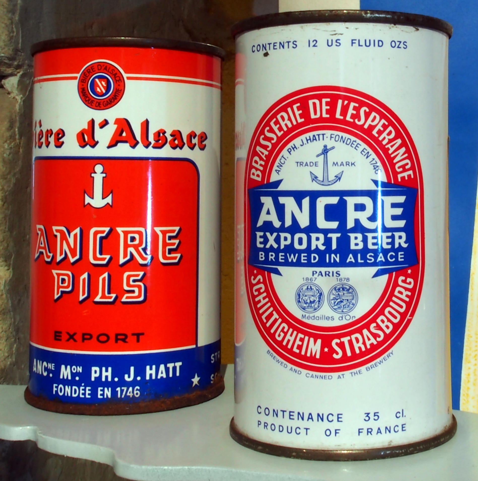 Ancre Beer cans at the Musée Européen de la Bière.